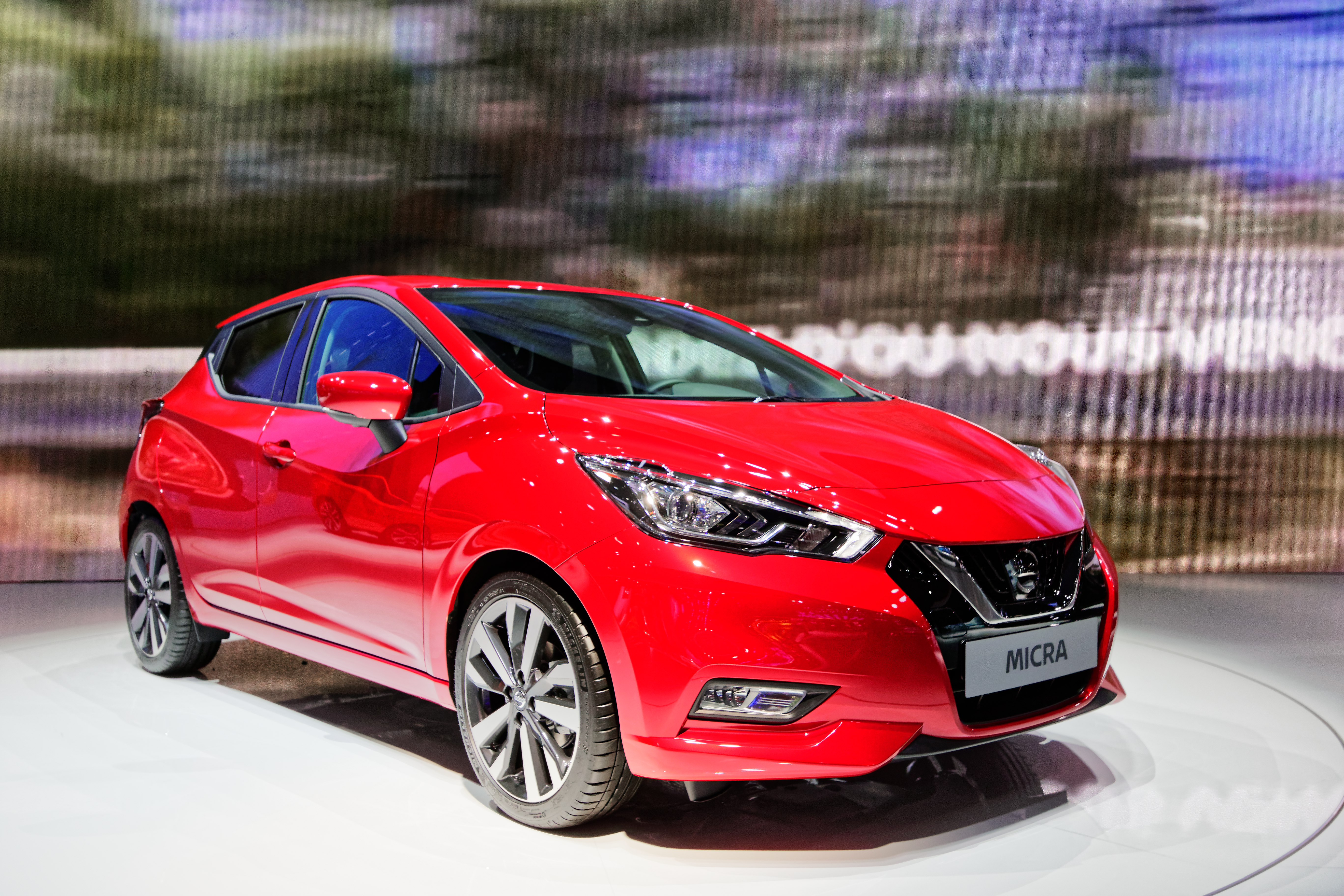 Une Nissan Micra présentée lors du mondial de l'automobile de Paris 2016.